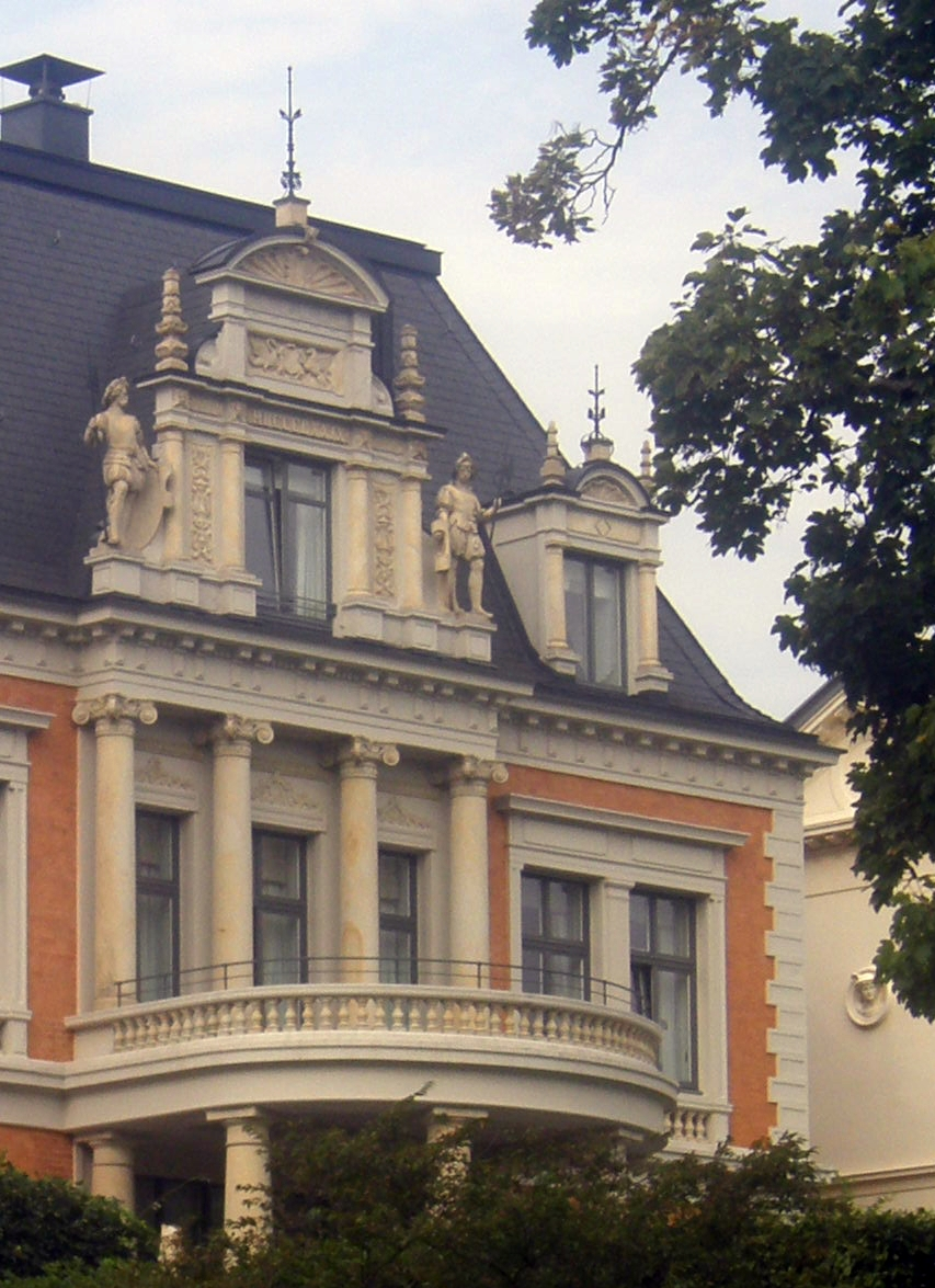 neo-renaissance